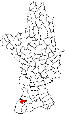 Categorie:Hărţi ale judeţului Olt